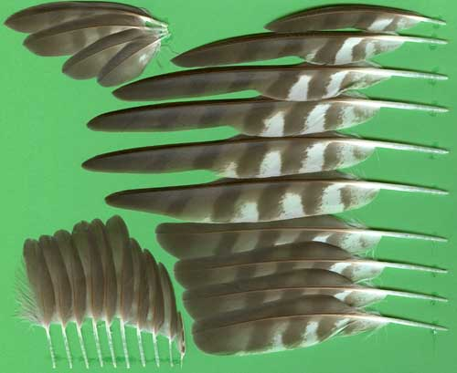 Handschwingen (mit gr. Handdecken und Alula) eines Sperbermännchens (Accipiter nisus)